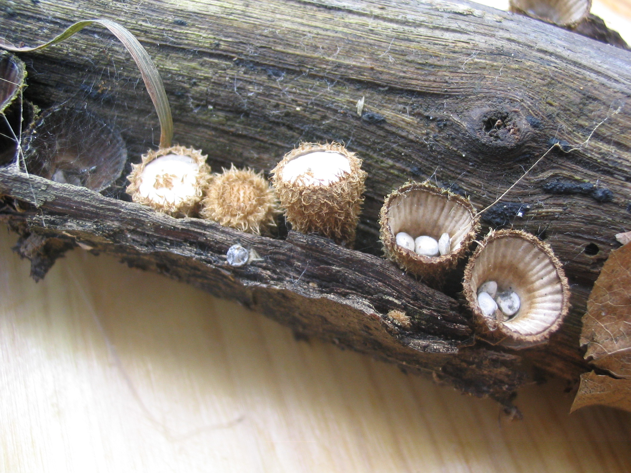 Gestreifter Teuerling (Cyathus striatus)